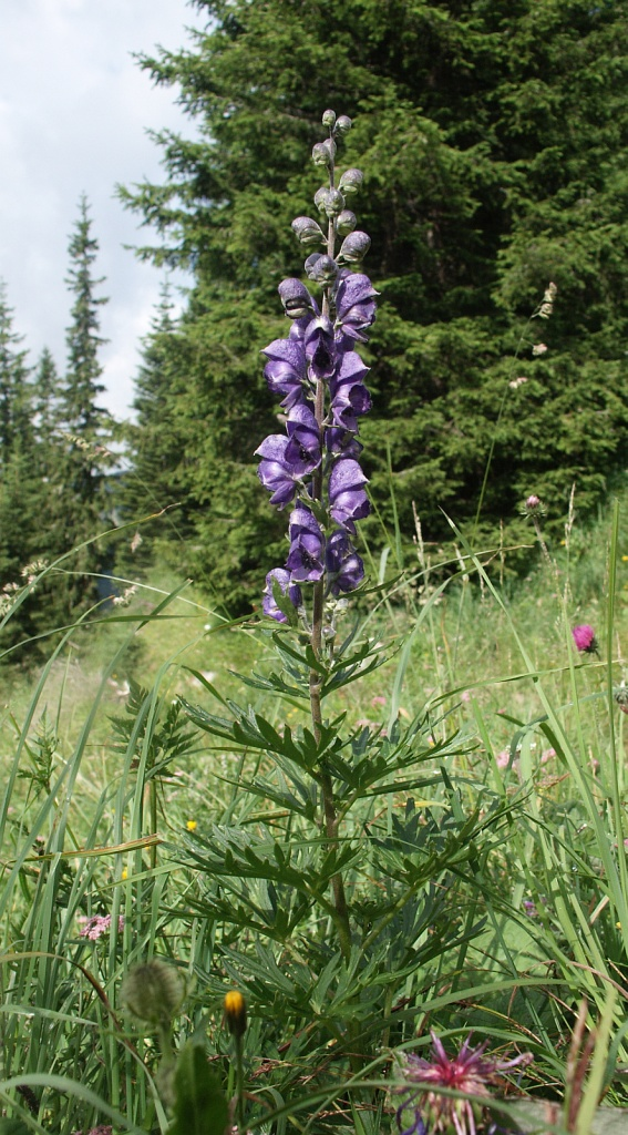 Aconitum napellus, Tannheimer Berge, Austria